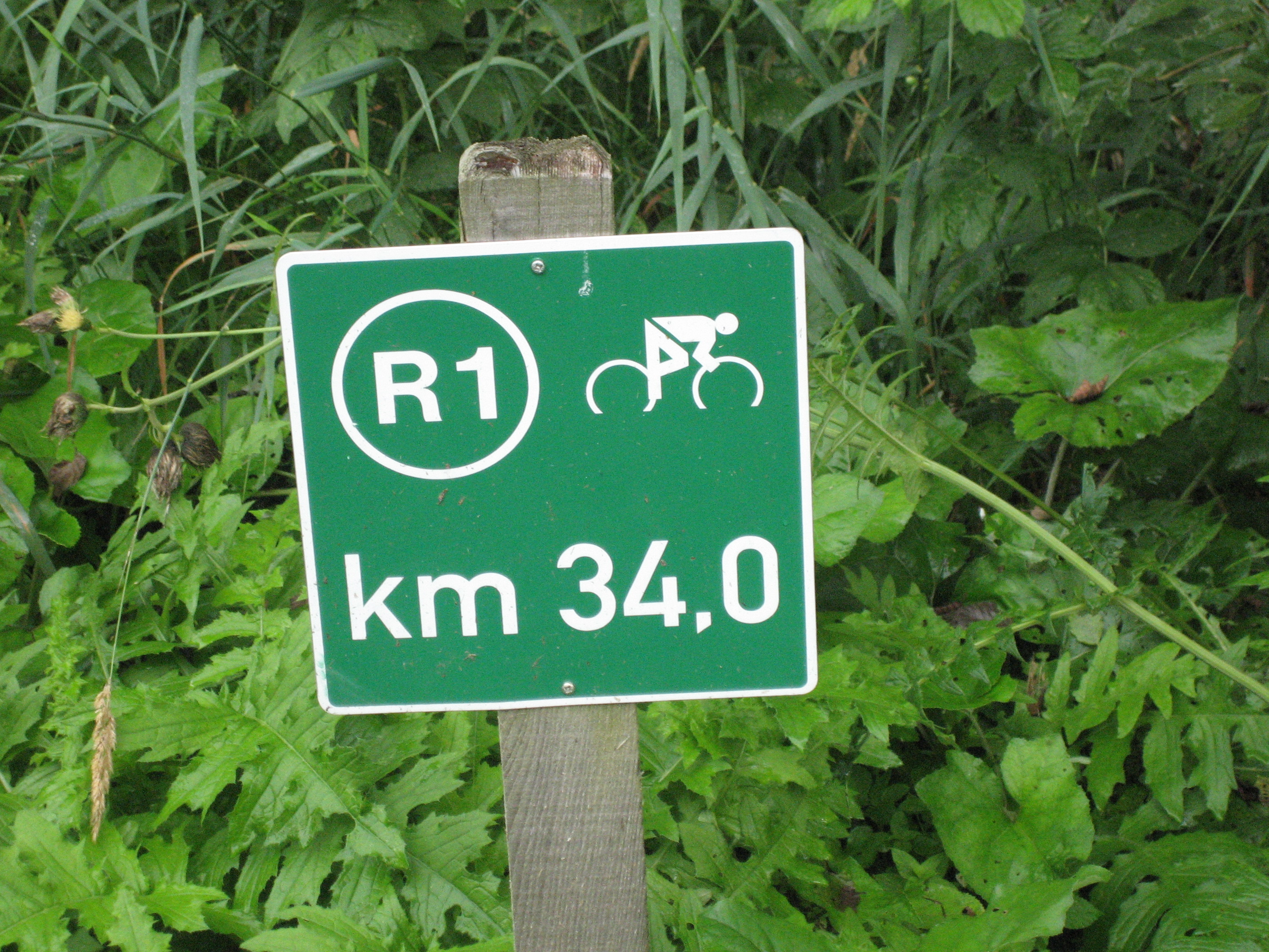 Hinweißschild an km 34 des Drauradwegs in Osttirol